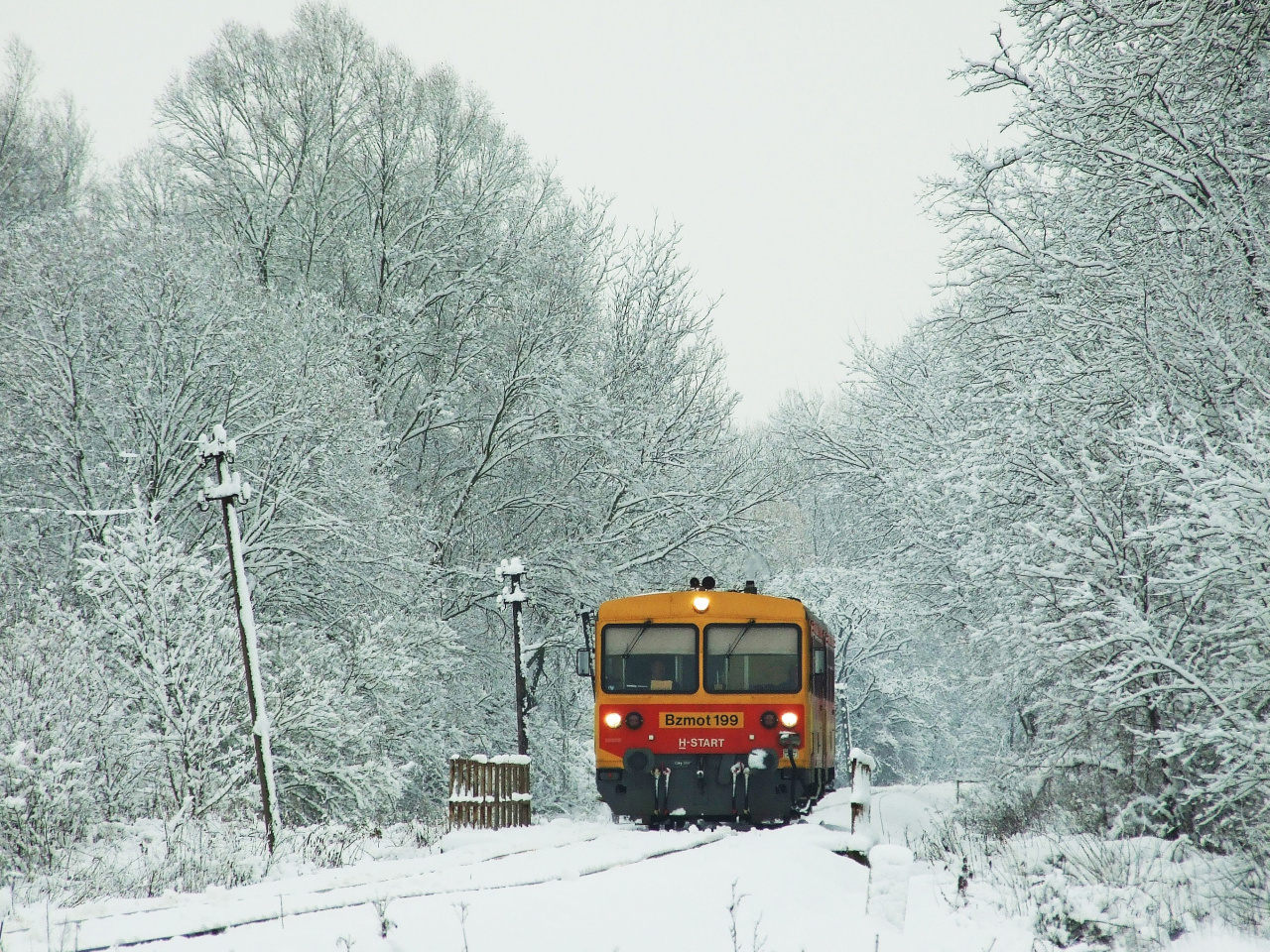 Személyvonat Pamuk megállóhely közelében egy téli napon